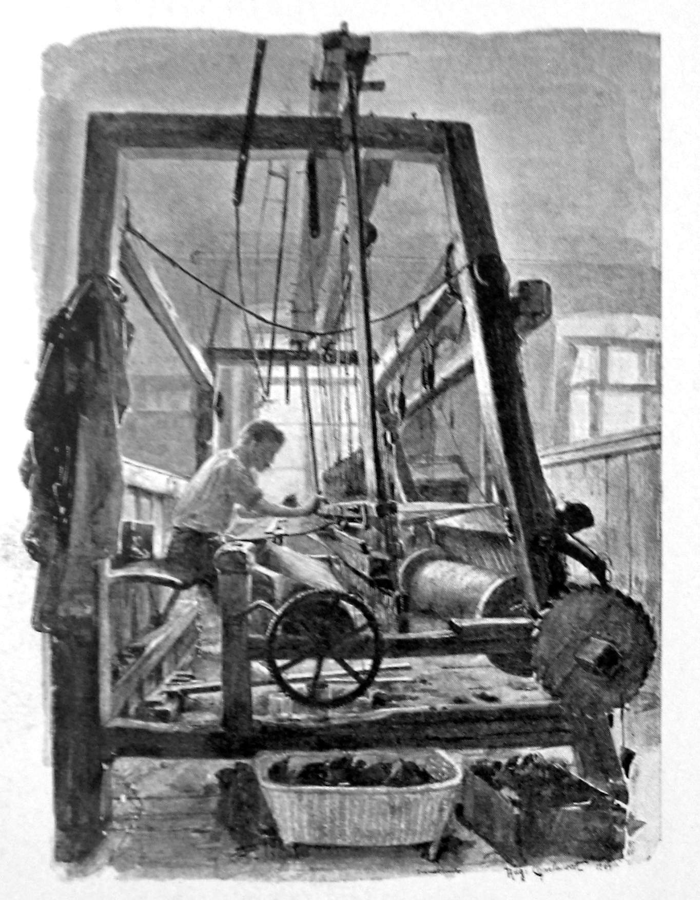 Sechzig Jahre am Webstuhl (Josef Kühnel), Franz Baur’s Söhne.